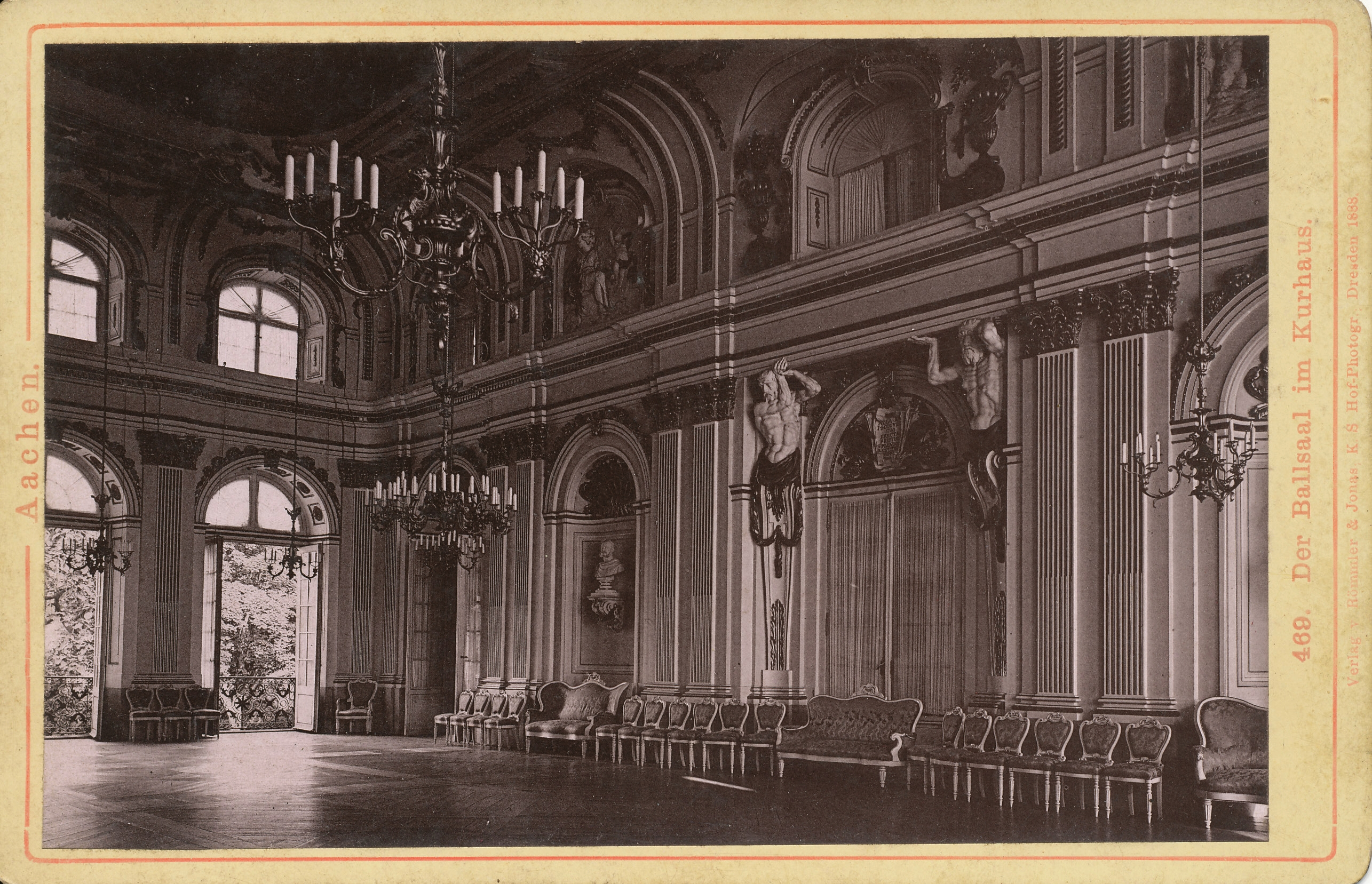 Der Ballsaal des Alten Kurhauses, 1906